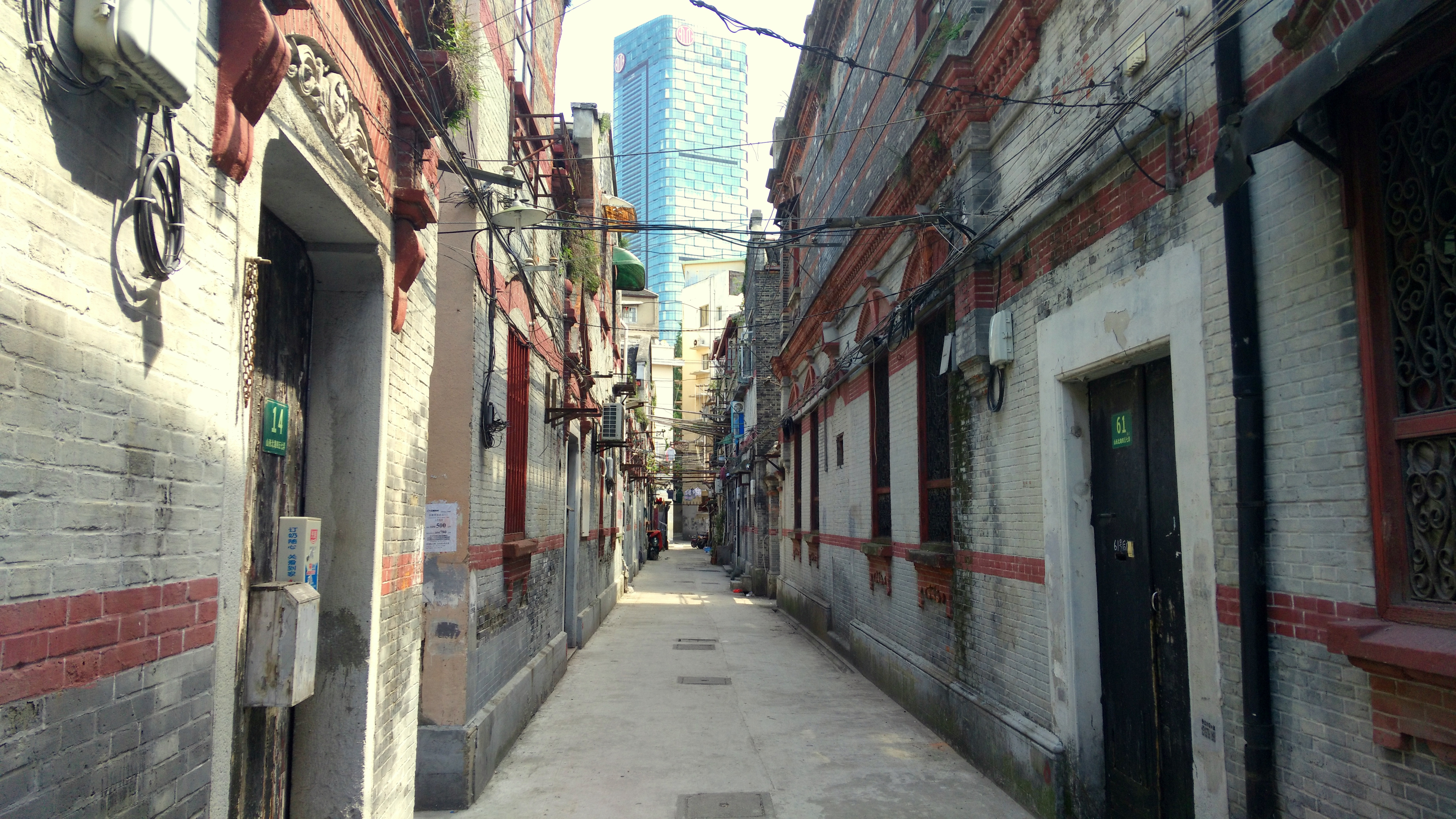 上海闸北区山西北路457弄石库门弄堂